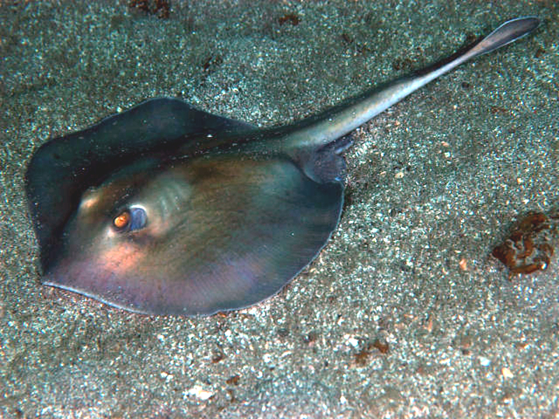 ヒラタエイ Urolophus aurantiacus